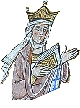 Gertruda Meránská